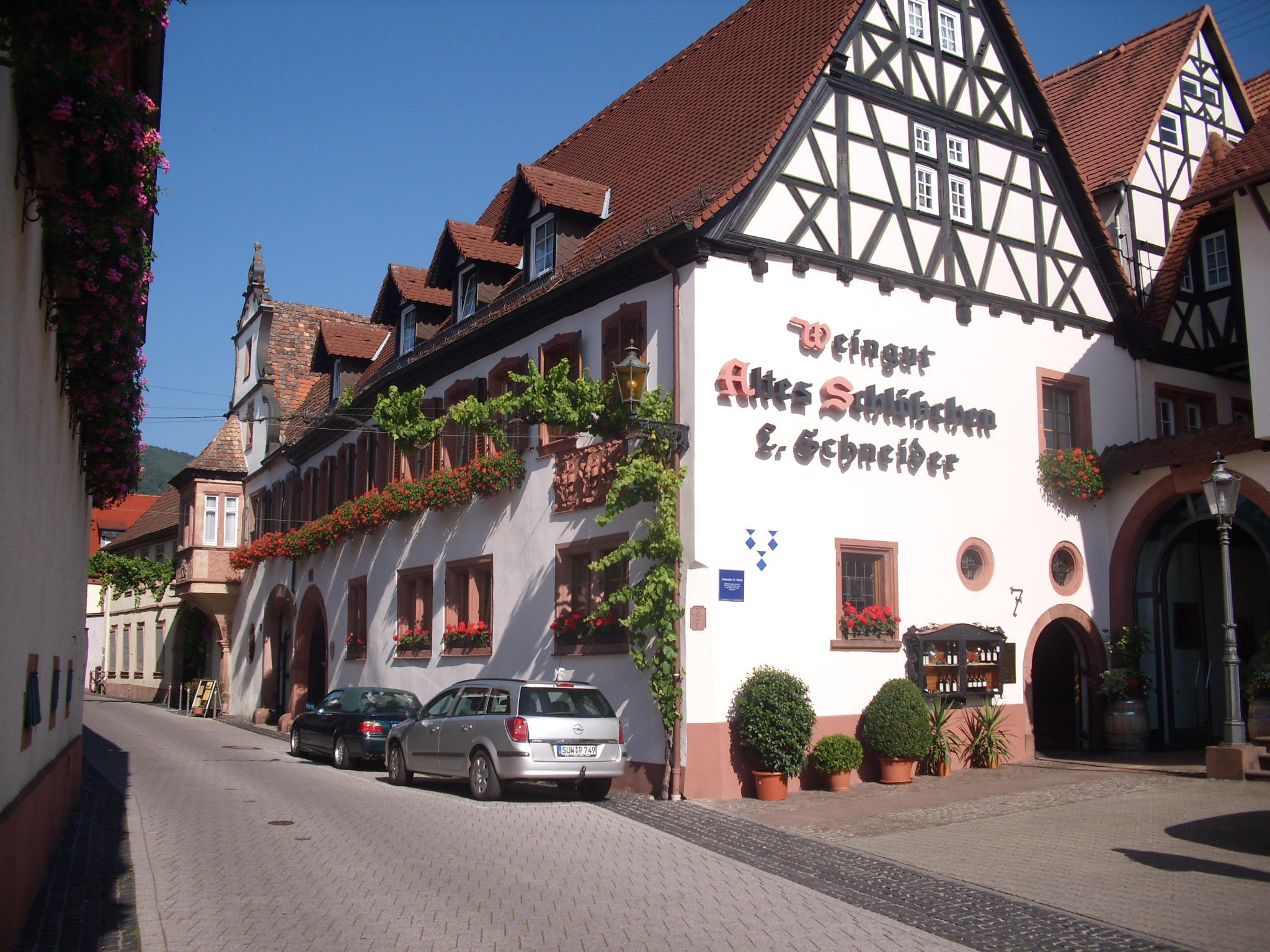 Altes Schloesschen - Maikammerer Str. - Sankt Martin - Verbandsgemeinde Maikammer - Rijnland-Palts - Duitsland